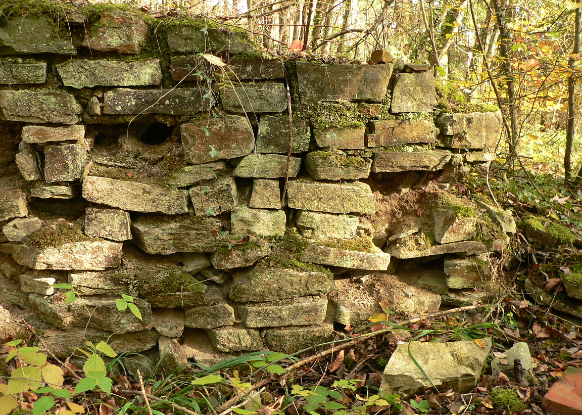 Römischer Gutshof „Im Weiler“